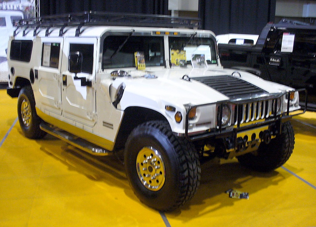 Hummer H1